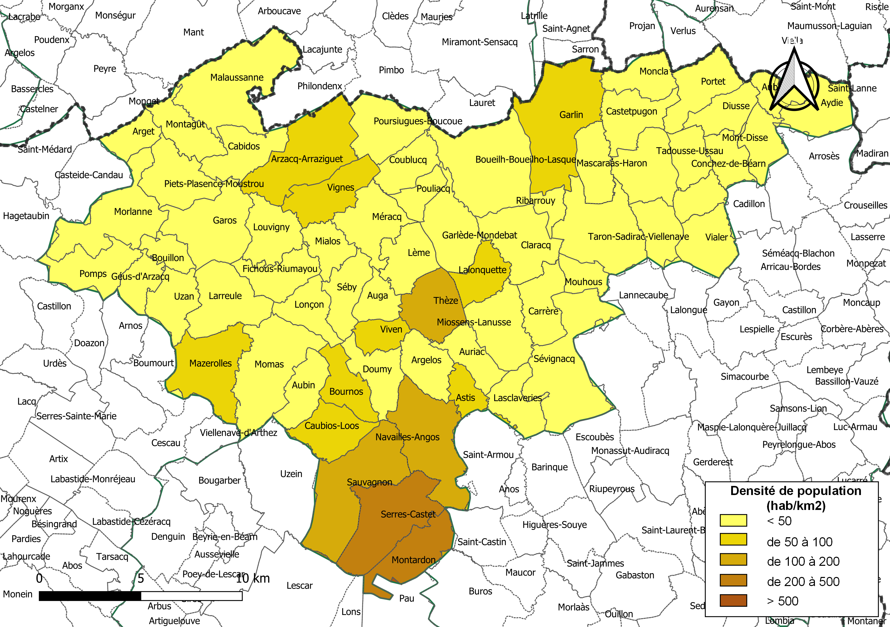 Carte des densités de population (millésimée 2016) des communes de la Communauté de communes des Luys en Béarn, département des Pyrénées-Atlantiques, France. Composition au 1er janvier 2019.